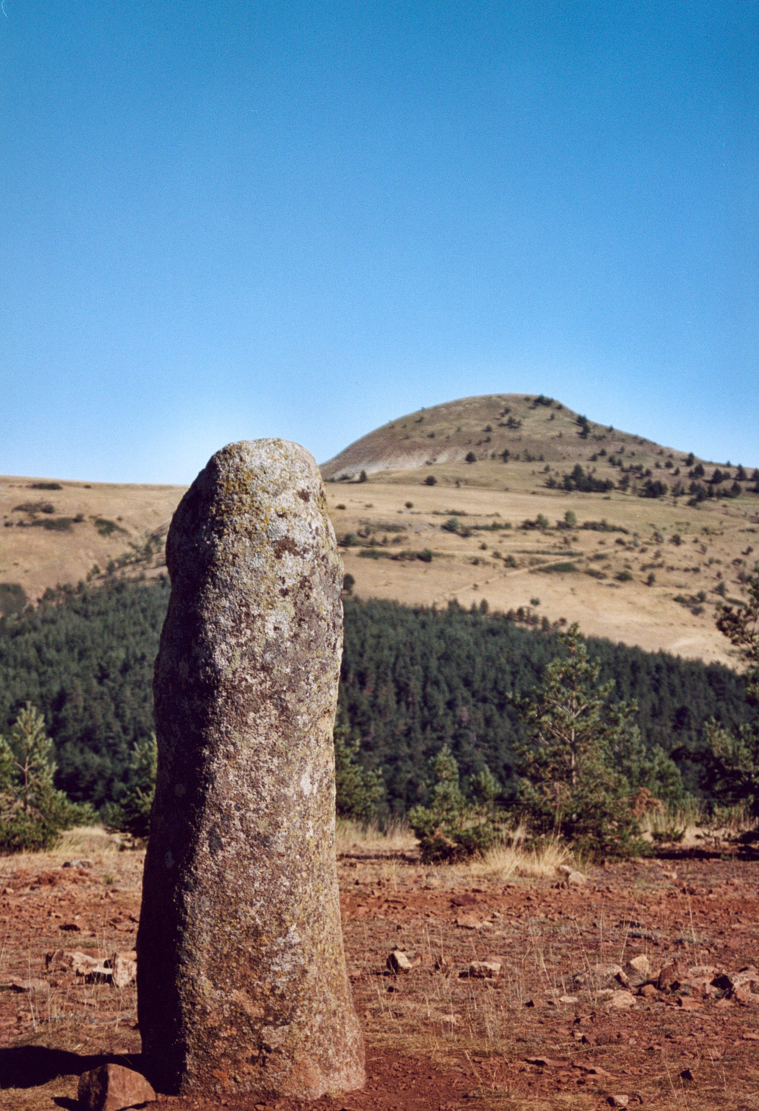 France Lozère Les Bondons Le Cham des Bondons Photographie prise par GIRAUD Patrick Août 2005